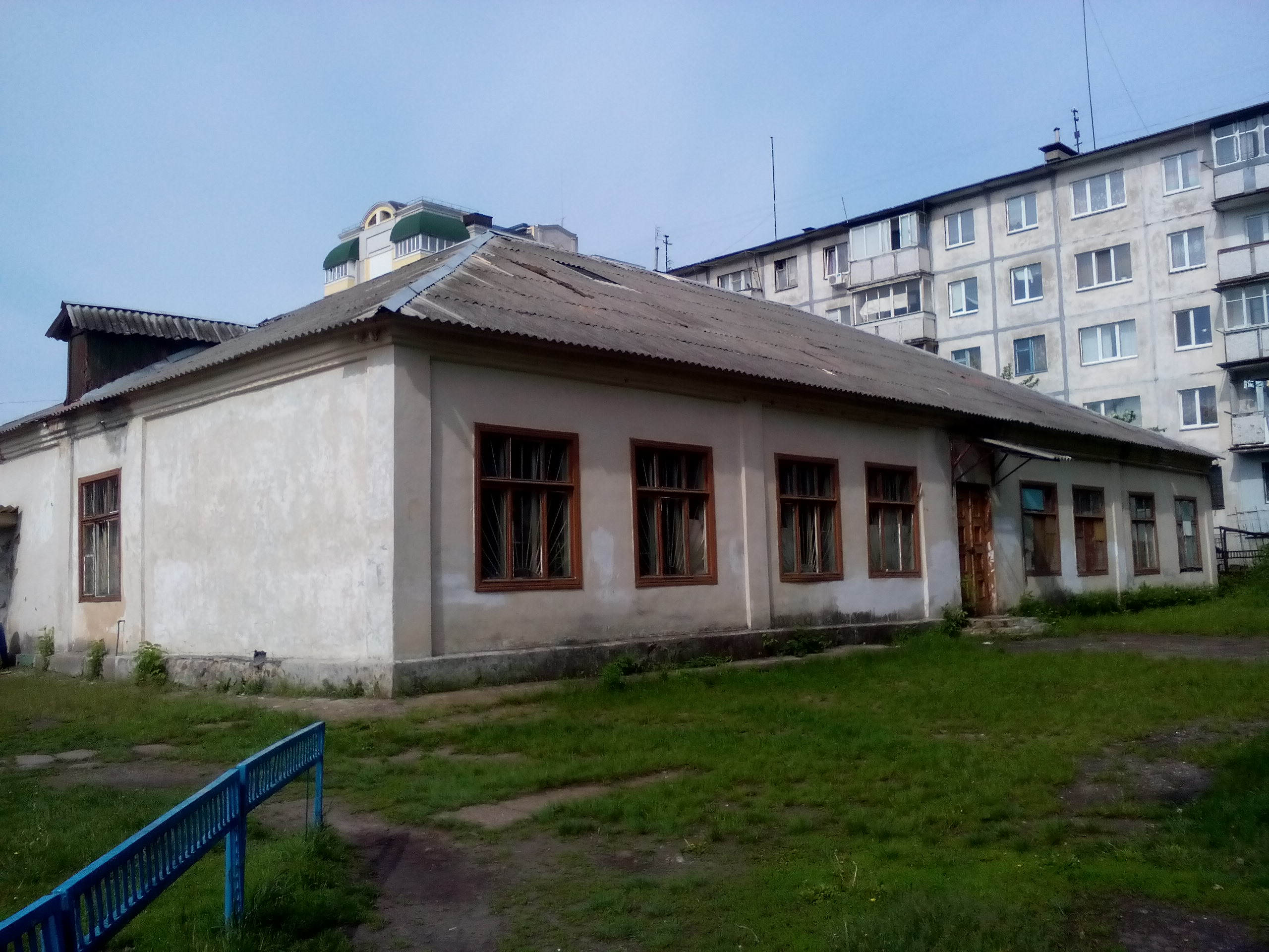 Черкаська ЗОШ №5. Стара будівля